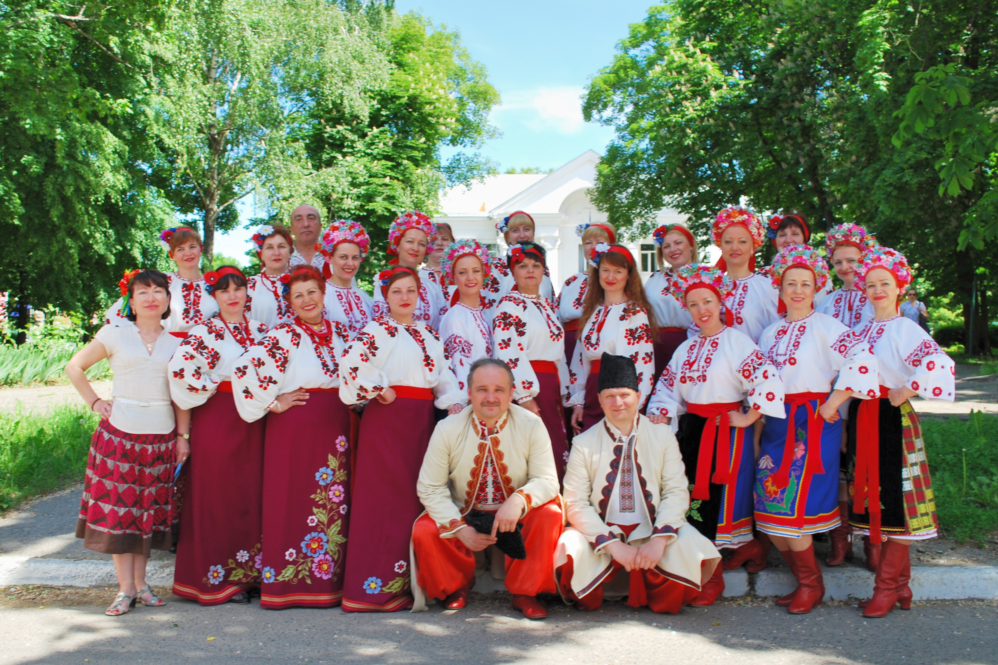 Народний аматорський колектив «Криниця»